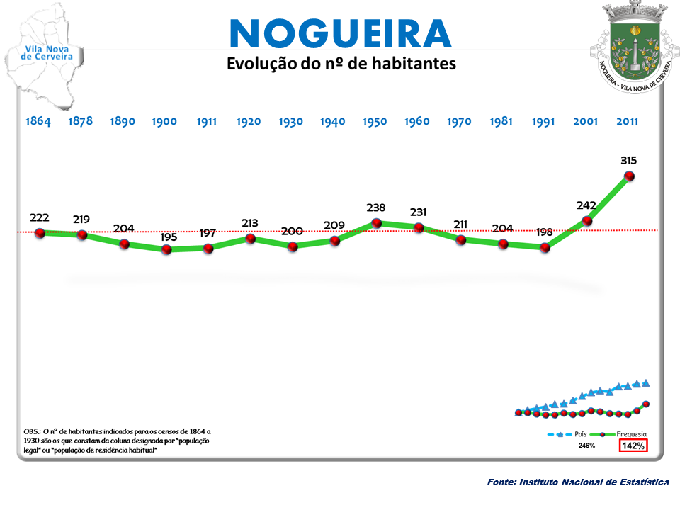 Censos 1864/2011